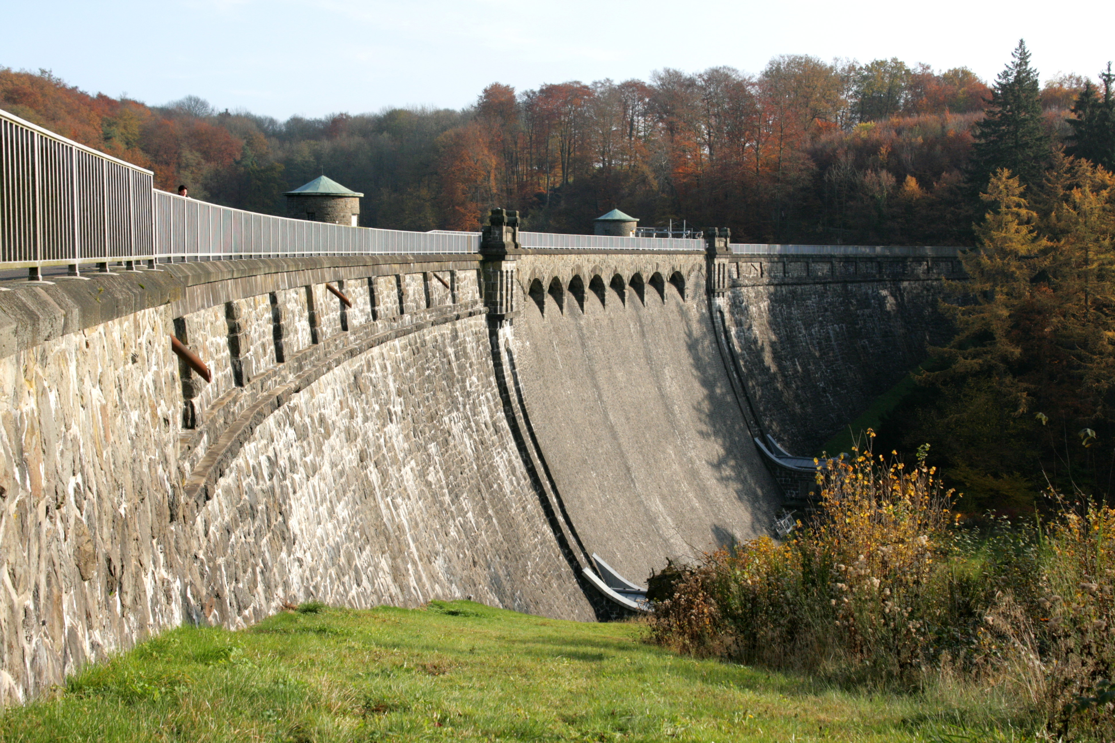 Neyetalsperre in Wipperfürth (nicht Hückeswagen!)